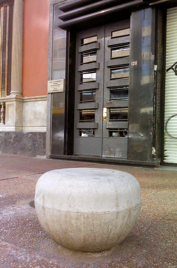 Marca de la memoria frente a la excasa del senador Amílcar Vasconcellos (Montevideo)